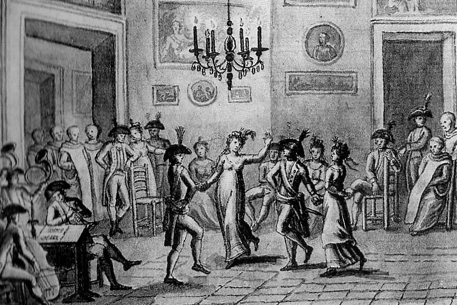 Napoli nel 1799 - Festeggiamenti dei rivoluzionari (Repubblica Partenopea). Autore sconosciuto.